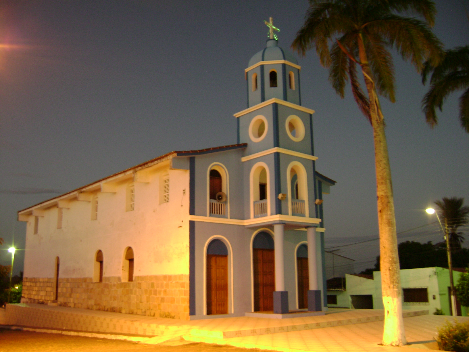 Igreja Matriz de Várzea - Rio Grande do Norte